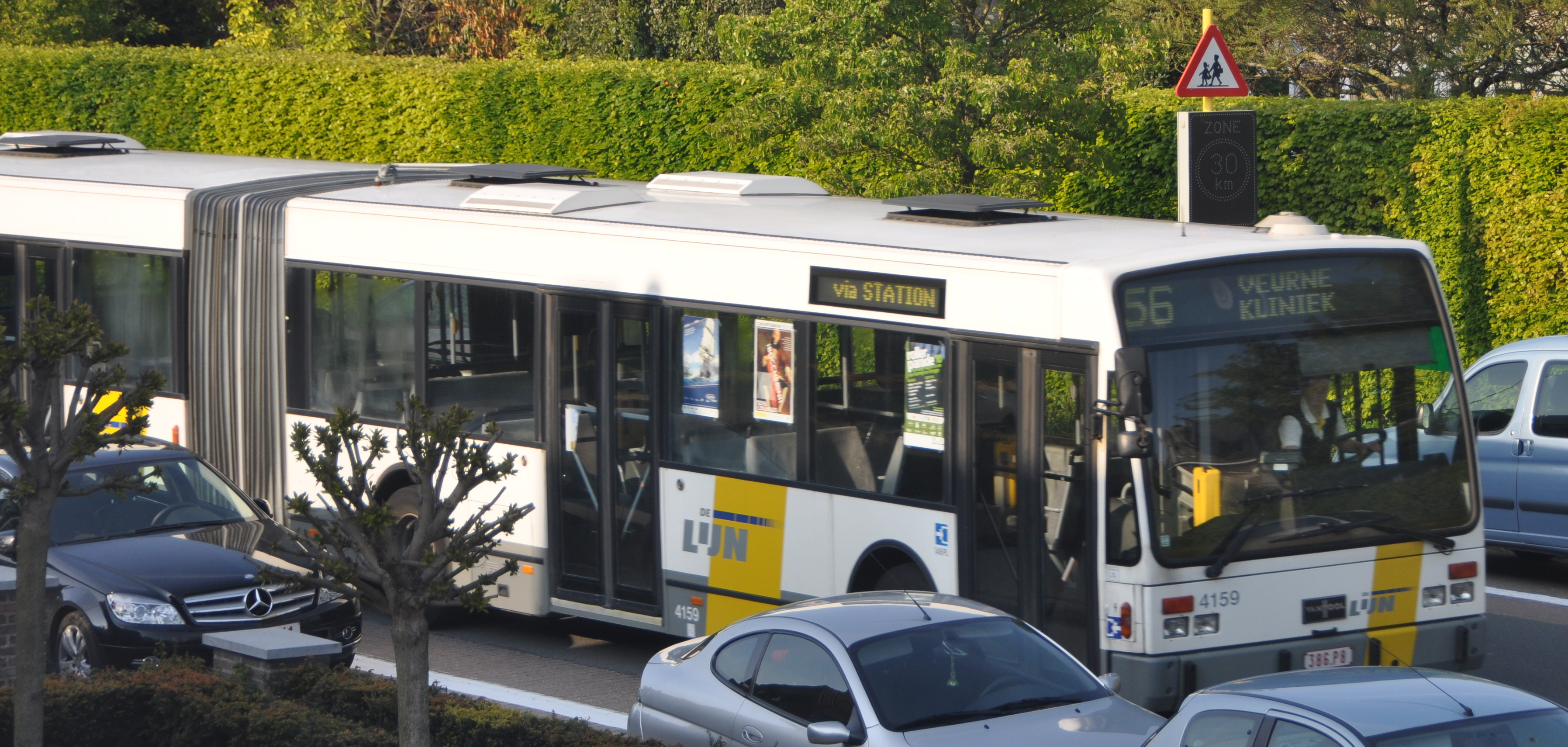 bus komende van De Panne op weg naar Veurne Kliniek, een belangrijk knooppunt in Veurne